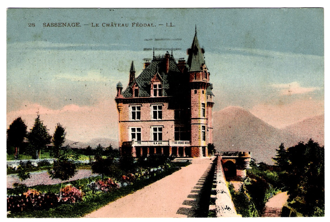 Château de Beaurevoir en Sassenage, (Isère) France